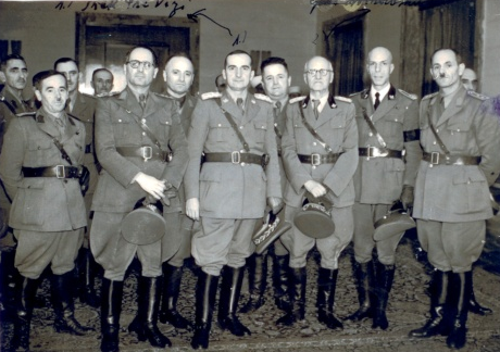 Gjeneral Pervizi me shtabin e lartë të ushtrisë shqiptare.